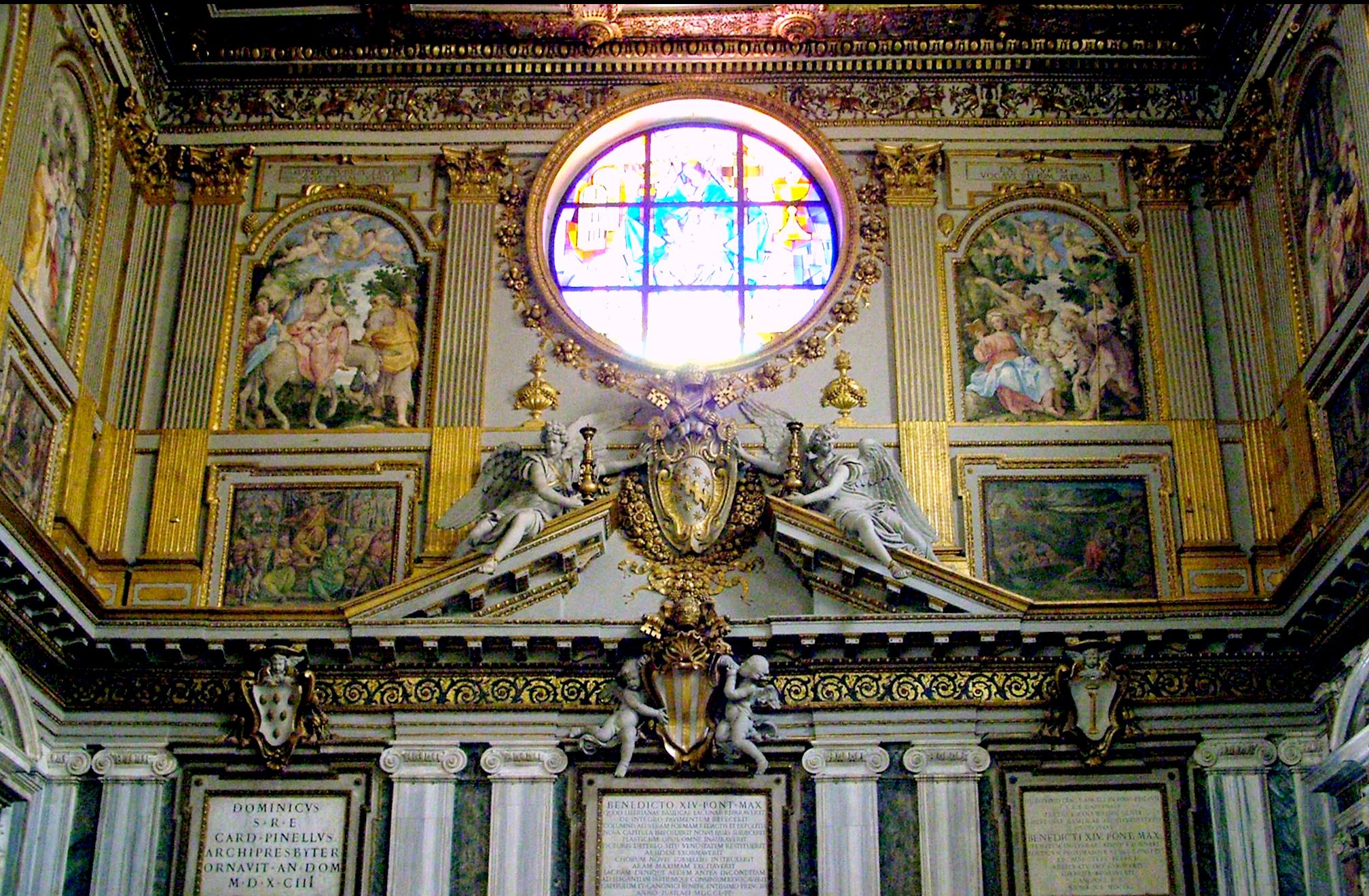 Santa Maria Maggiore, Róma. A főbejárat feletti belső faldíszítés